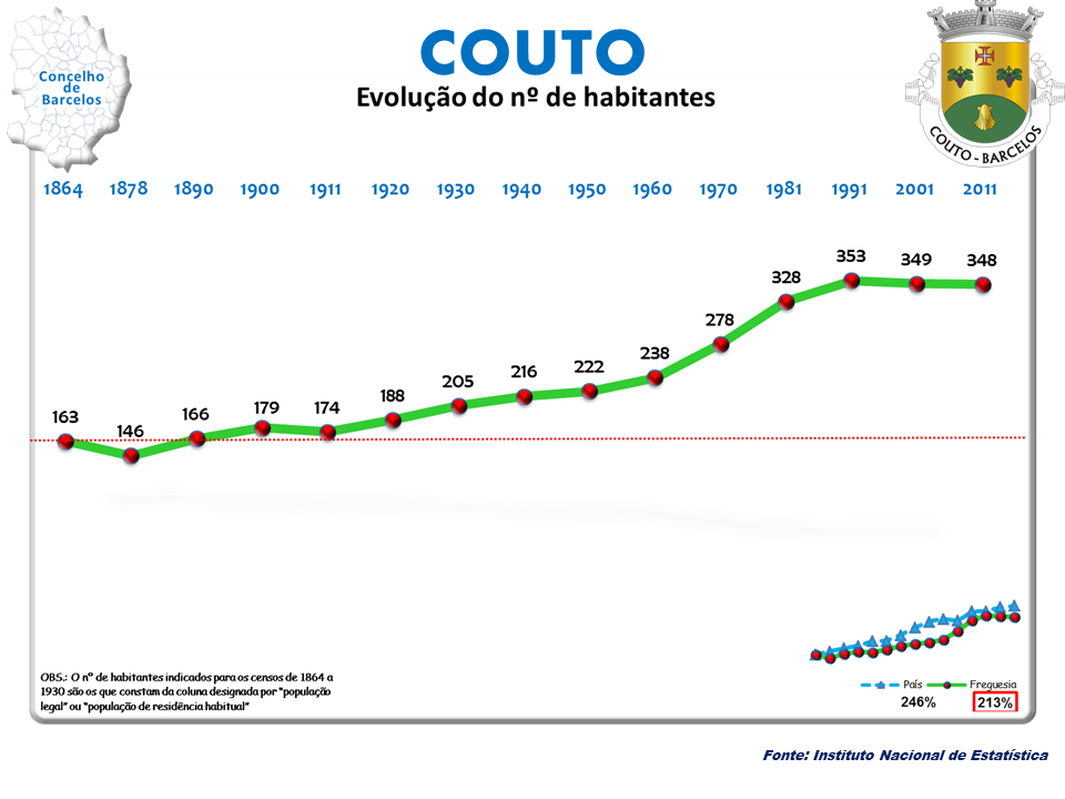 anos1864/2011